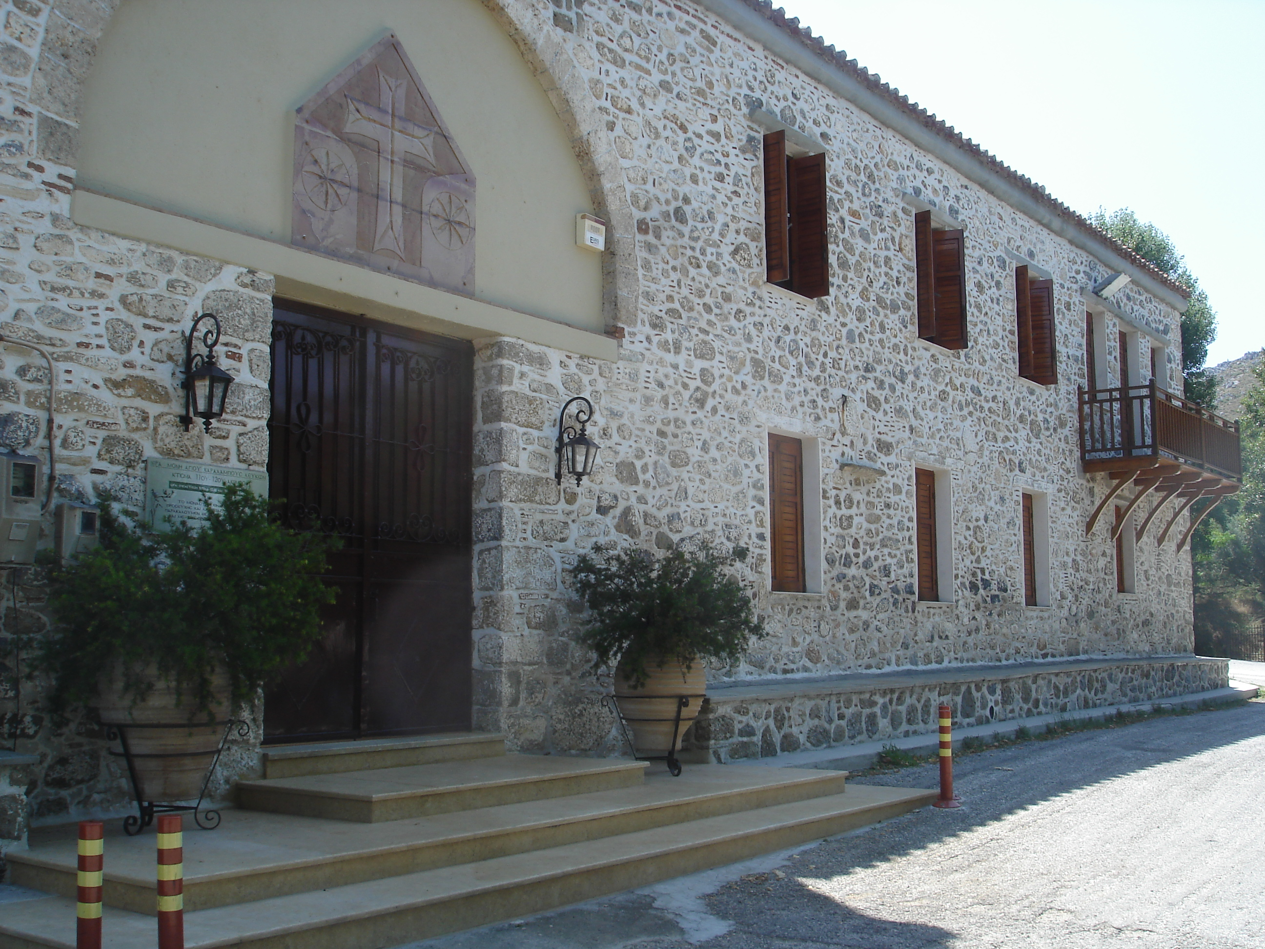 Monastère Agios Haralambos, près d'Avionari sur l'ile d'Eubée (Greece)